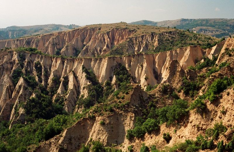 Melnik_Pyramides_01.jpg